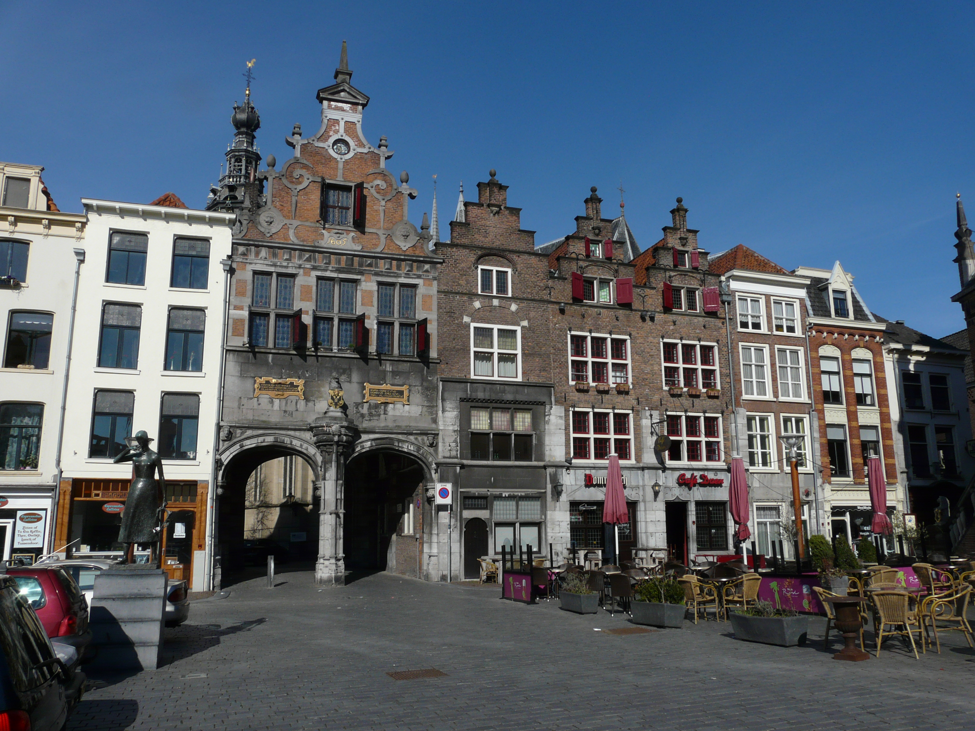 Zicht op een deel van de Grote Markt in het centrum van Nijmegen